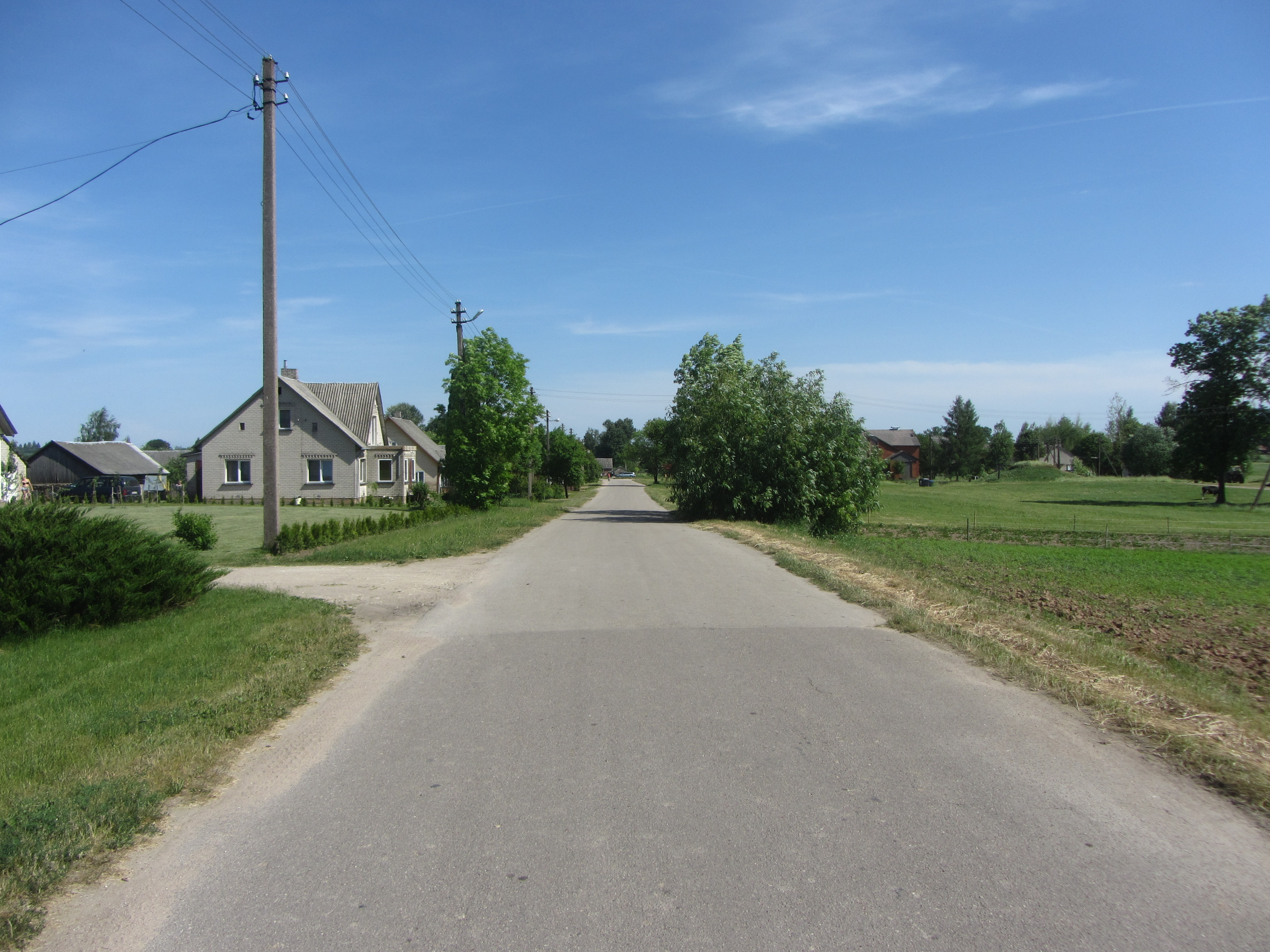 Vėžionys 59433, Lithuania